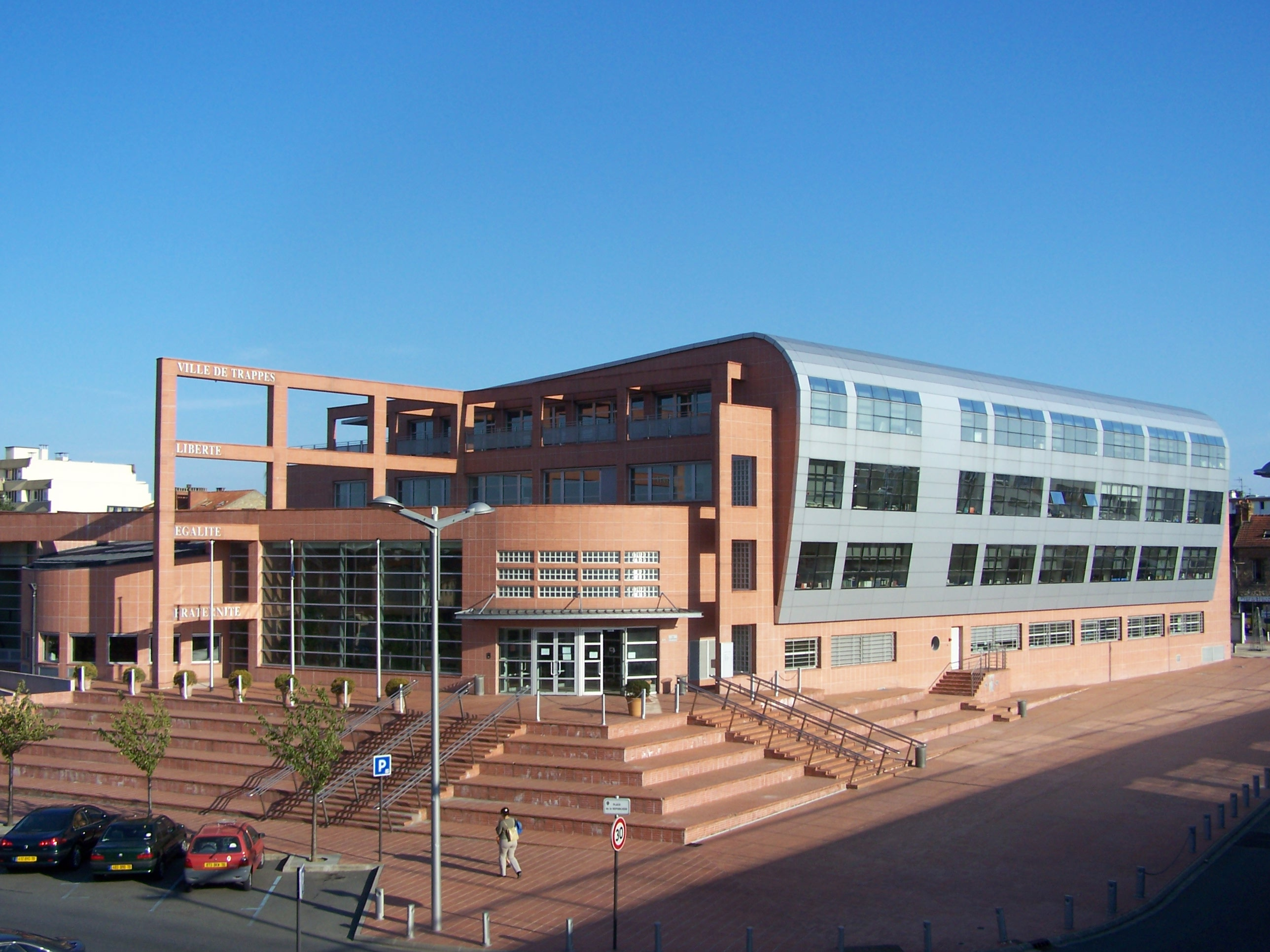 Mairie de Trappes (Yvelines, France)